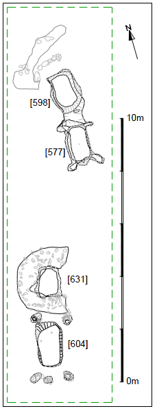 Kuml 3